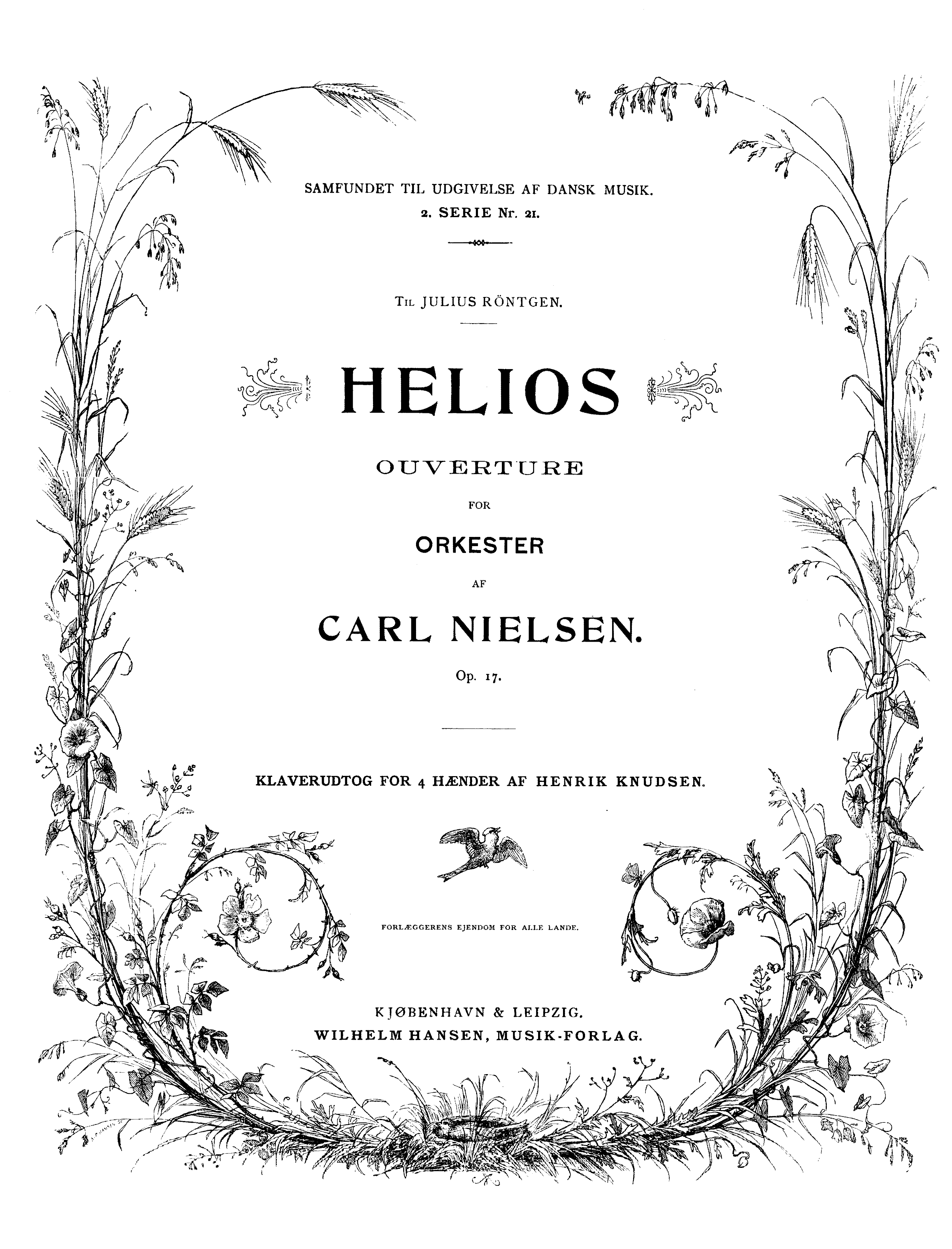 A Héliosz-nyitány (op. 17., CNW 34, FS 32) Henrik Knudsen által írt négykezes zongoraátiratának kottájának a borítója. 1905-ben jelent meg Koppenhágában a Wilhelm Hansen Kiadónál.